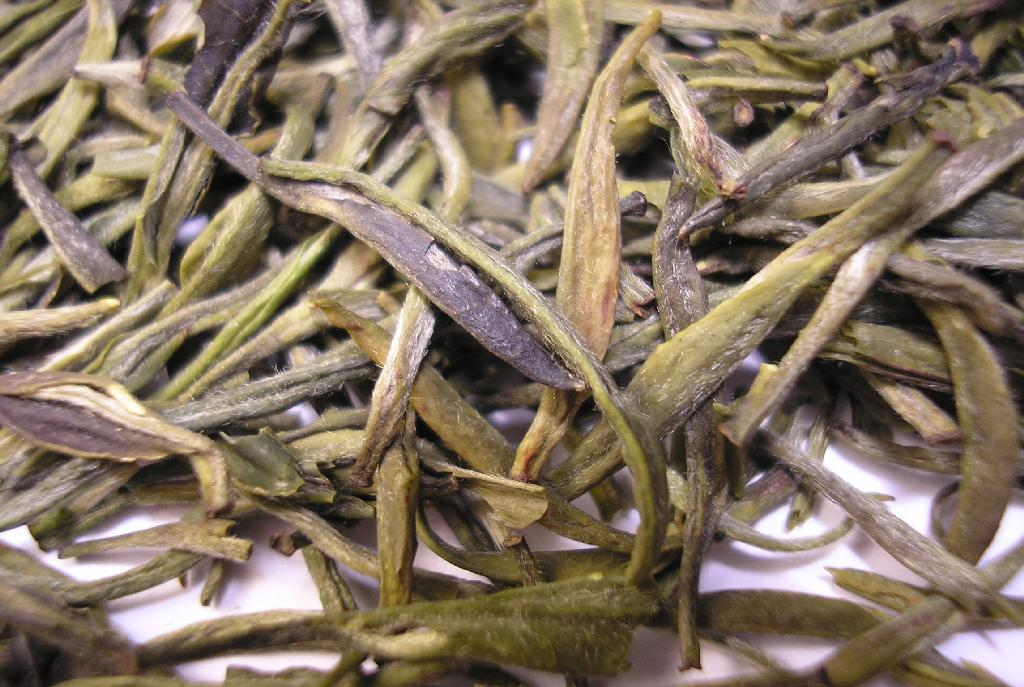 Huoshan Huangya tea leaves